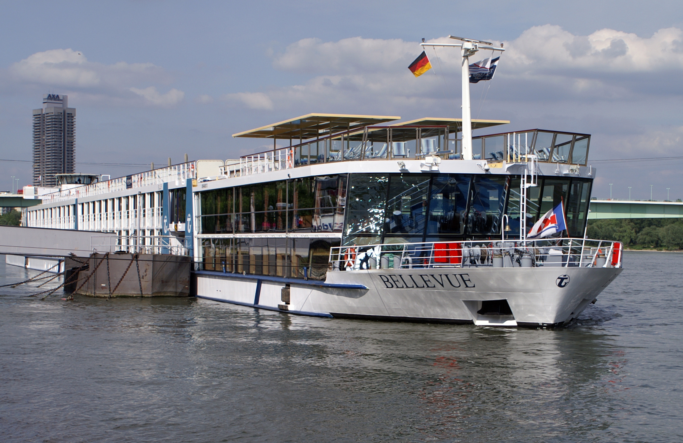 Flusskreuzfahrtschiff Bellevue am Anleger Köln.